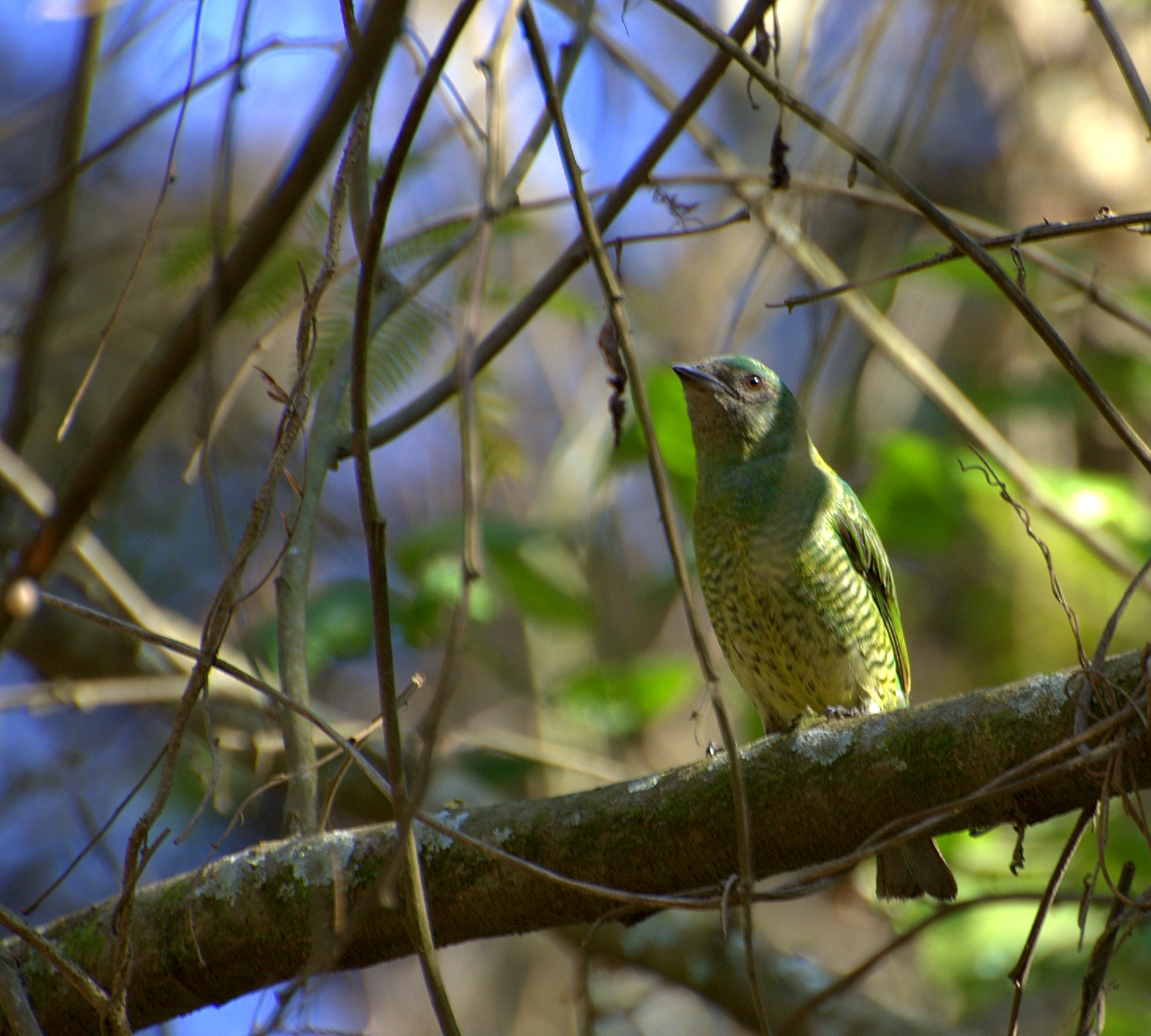 Horto Florestal de São Paulo